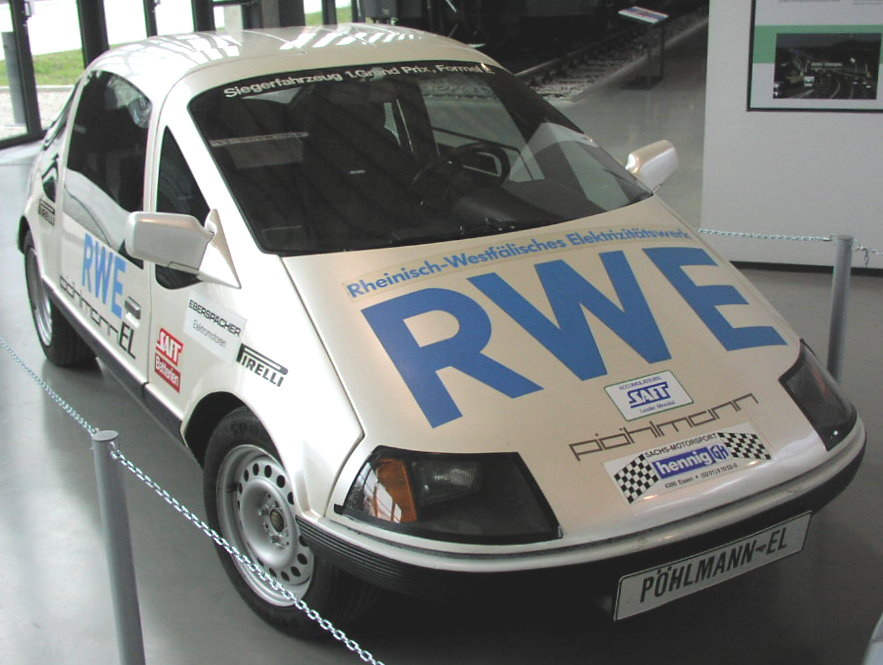 Pöhlmann EL